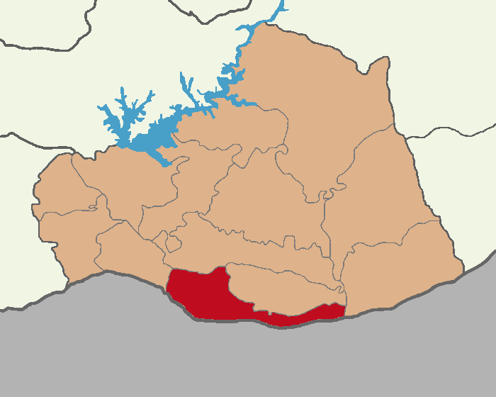 Akçakale ilçesinin konumu